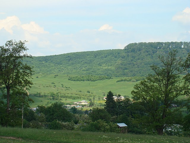 vedere de asamablu de pe dealul cimitirului